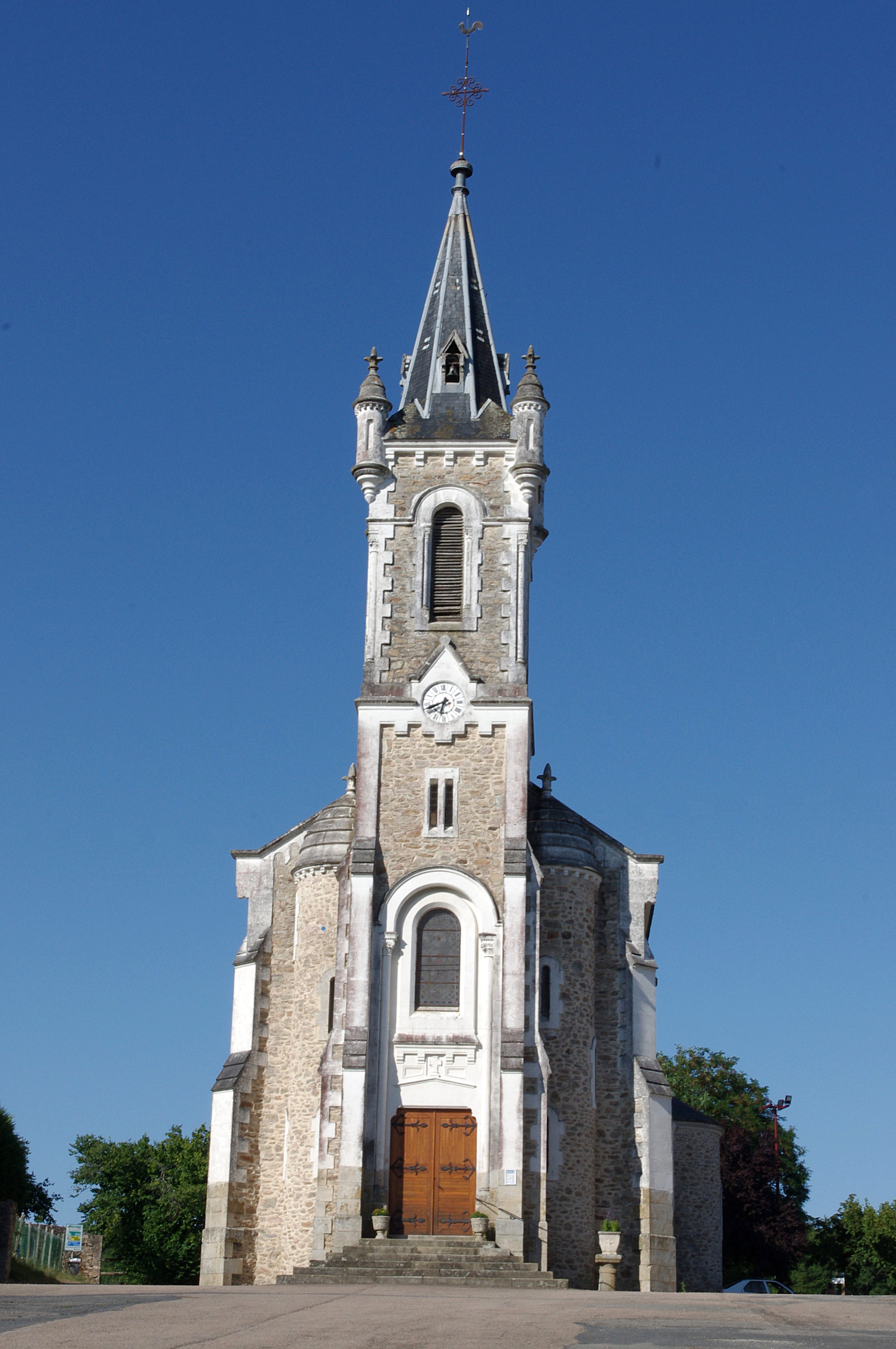 L'église de Gorre, Haute Vienne.